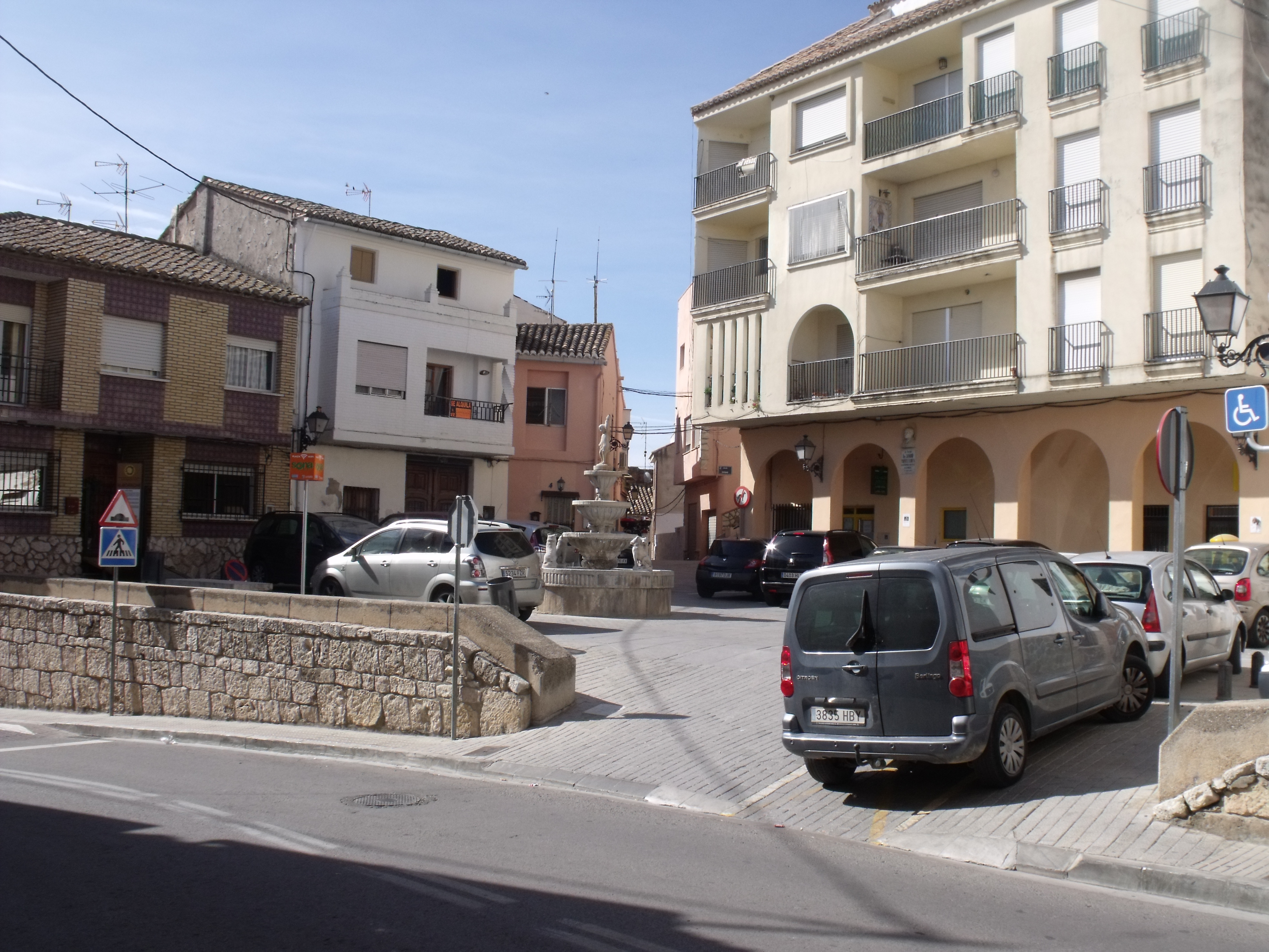 pendiente de descripción